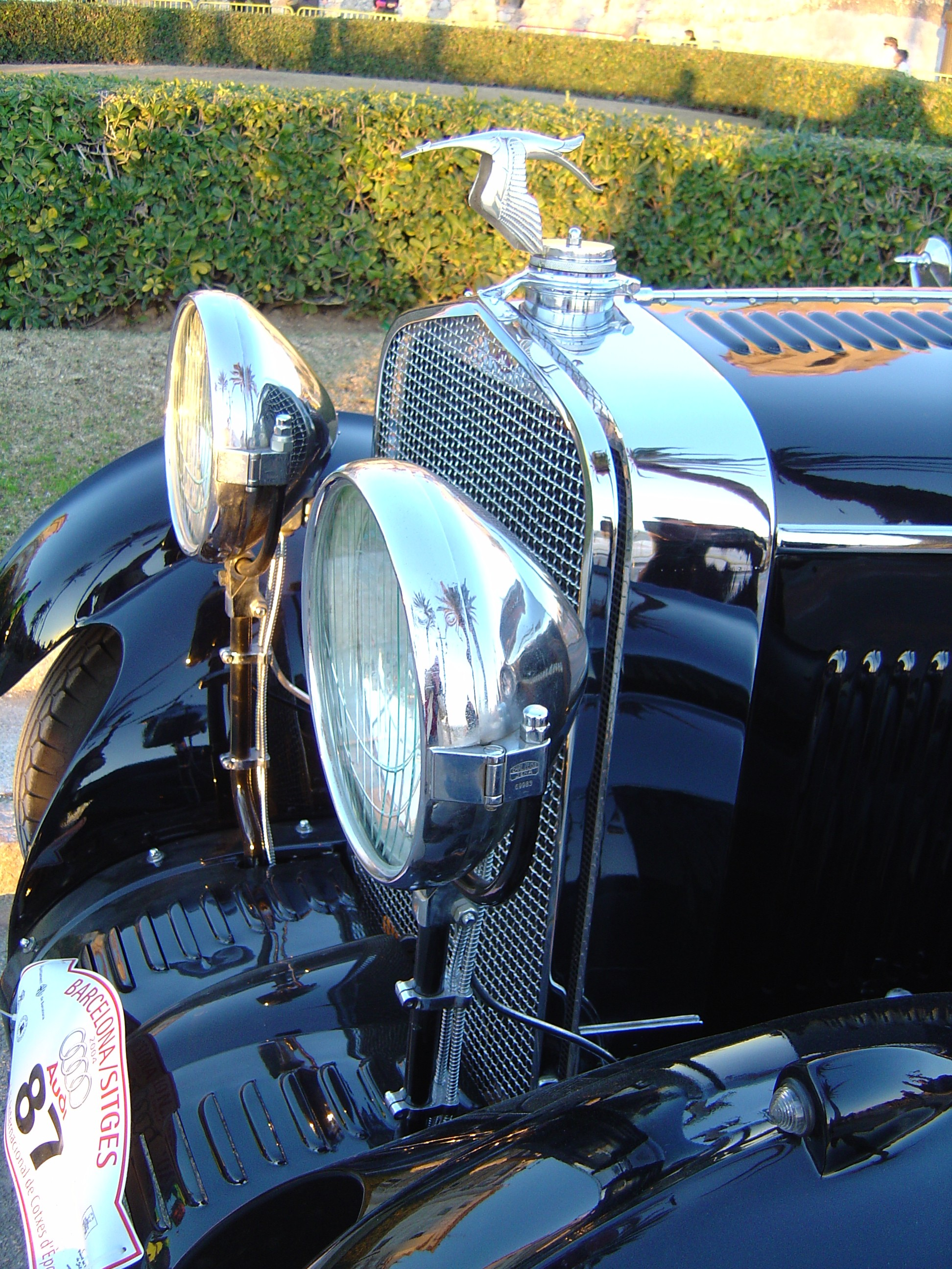 Eigen genomen foto